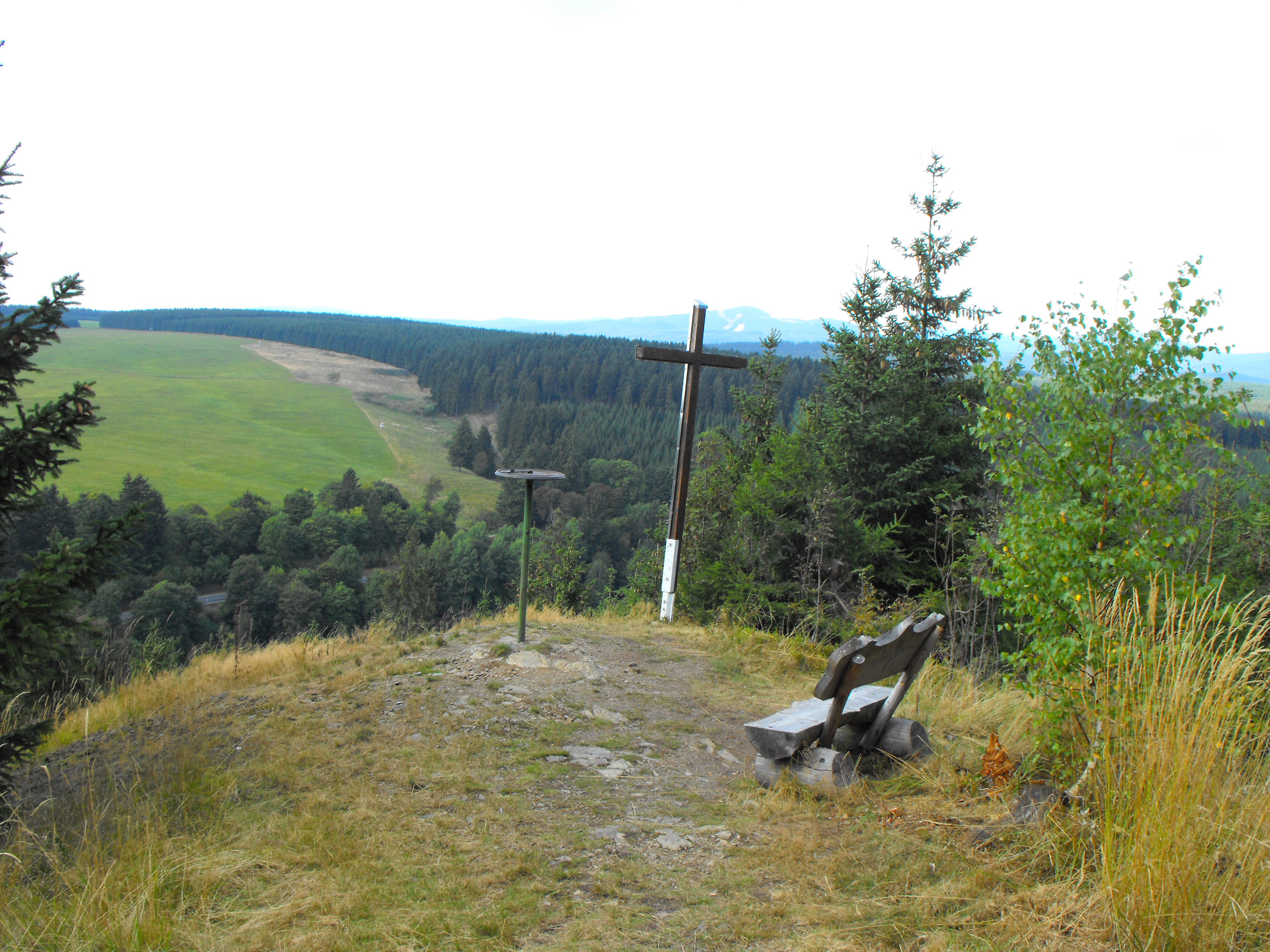 Aussichtspunkt am Kapitelsberg mit Bergkreuz und Orientierungstafel.